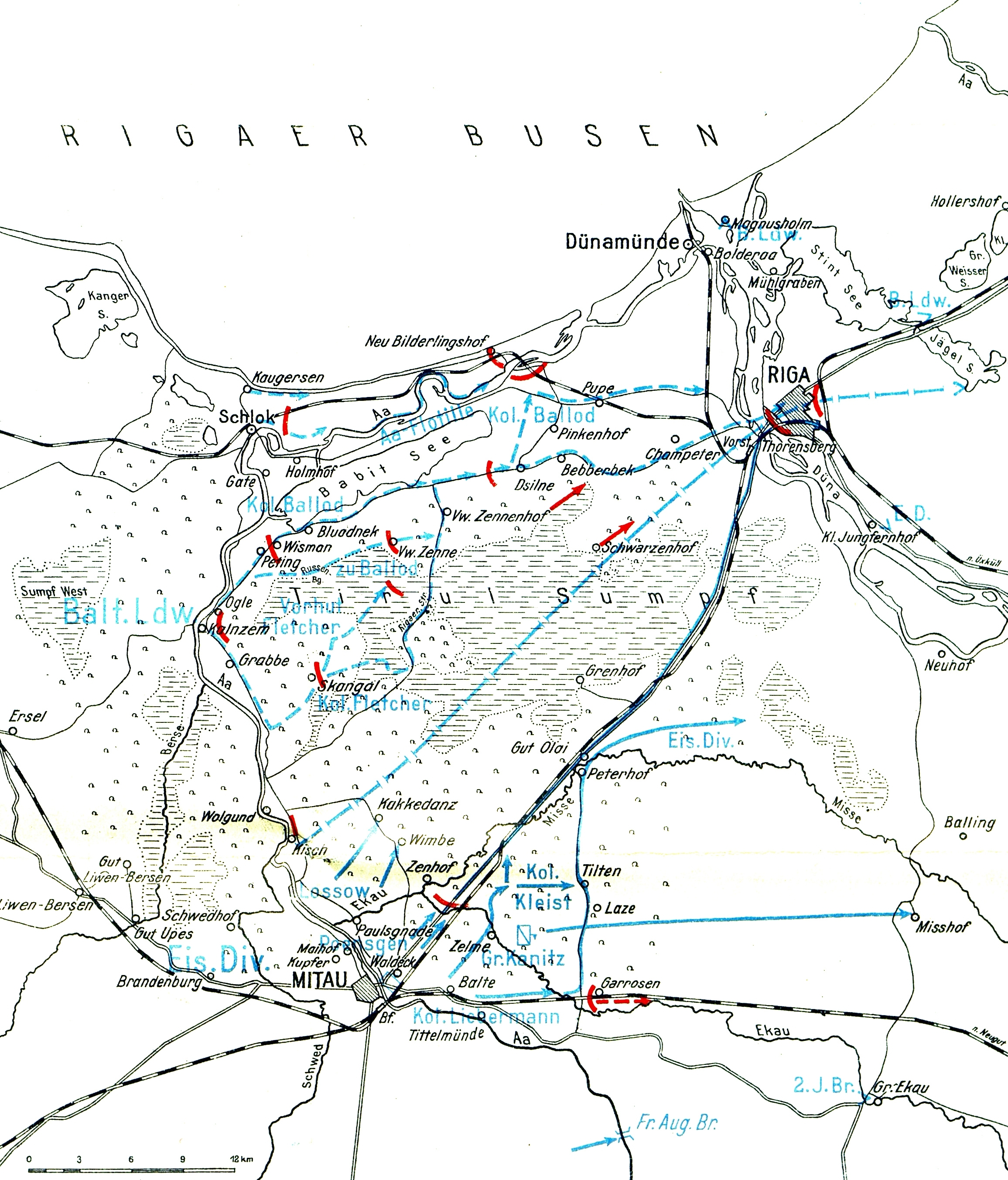 Angriff auf Riga